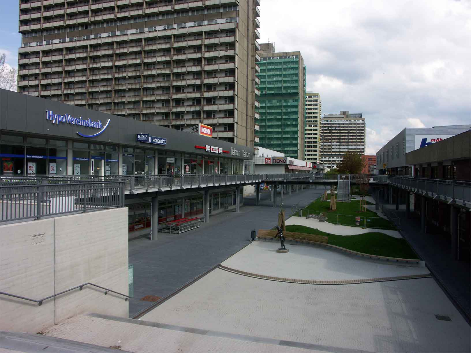 Zentrum von Halle-Neustadt: Neustädter Passage mit Hochhausscheiben, 1970-1975 erbaut, die Passage wurde 2005/2006 saniert